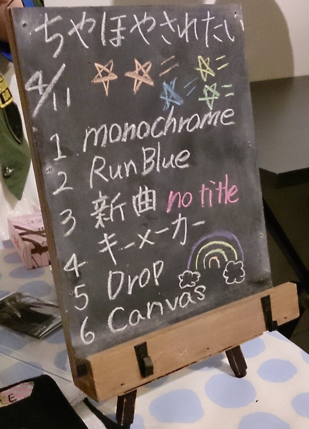 amiinaセトリボード(20150411(1))